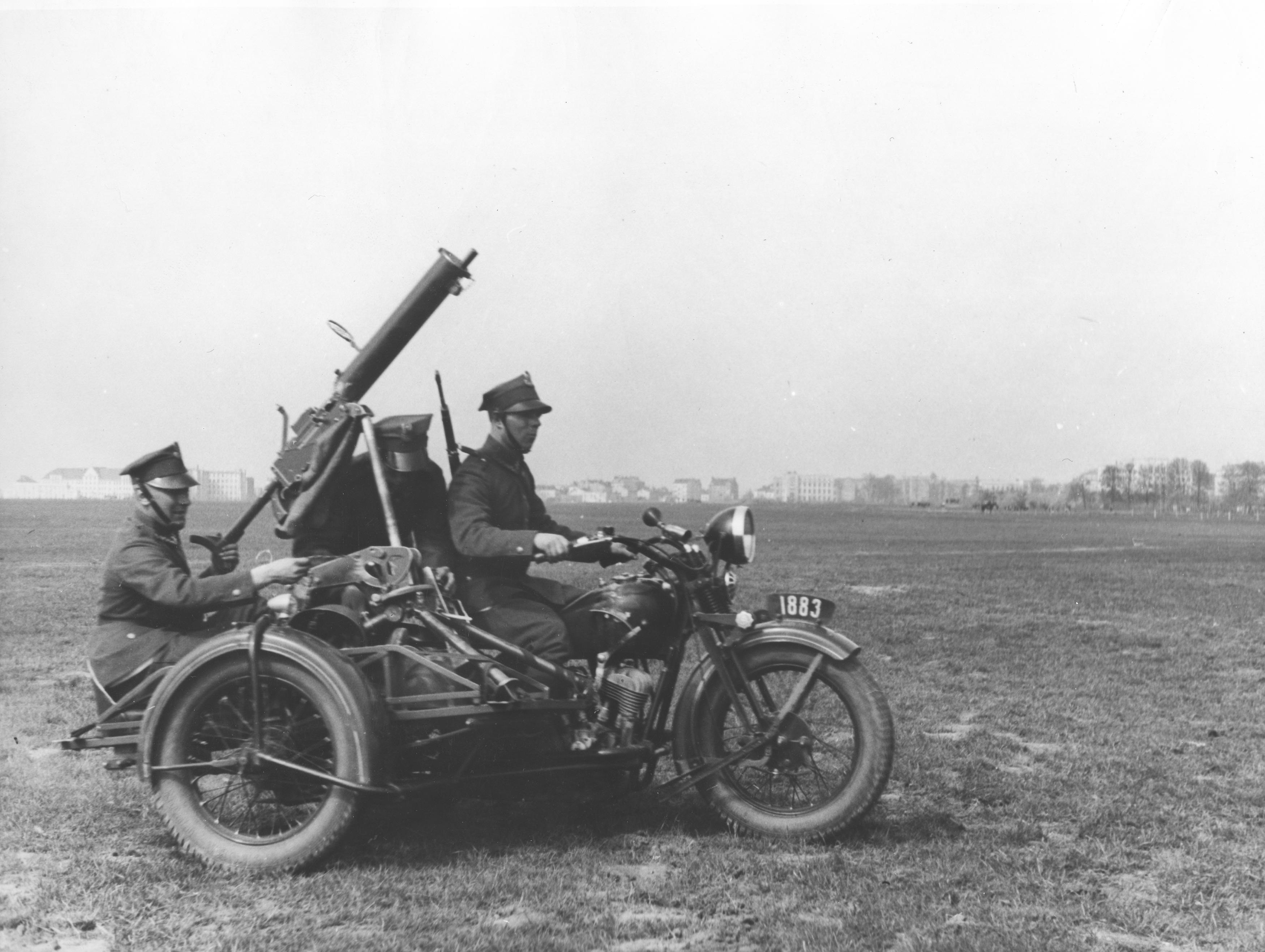 Pokaz oddziałów obrony przeciwlotniczej podczas rewii wojskowej na Polu Mokotowskim. Ciężki karabin maszynowy wz. 30 (wersja przeciwlotnicza) zamontowany na motocyklu Sokół 1000.